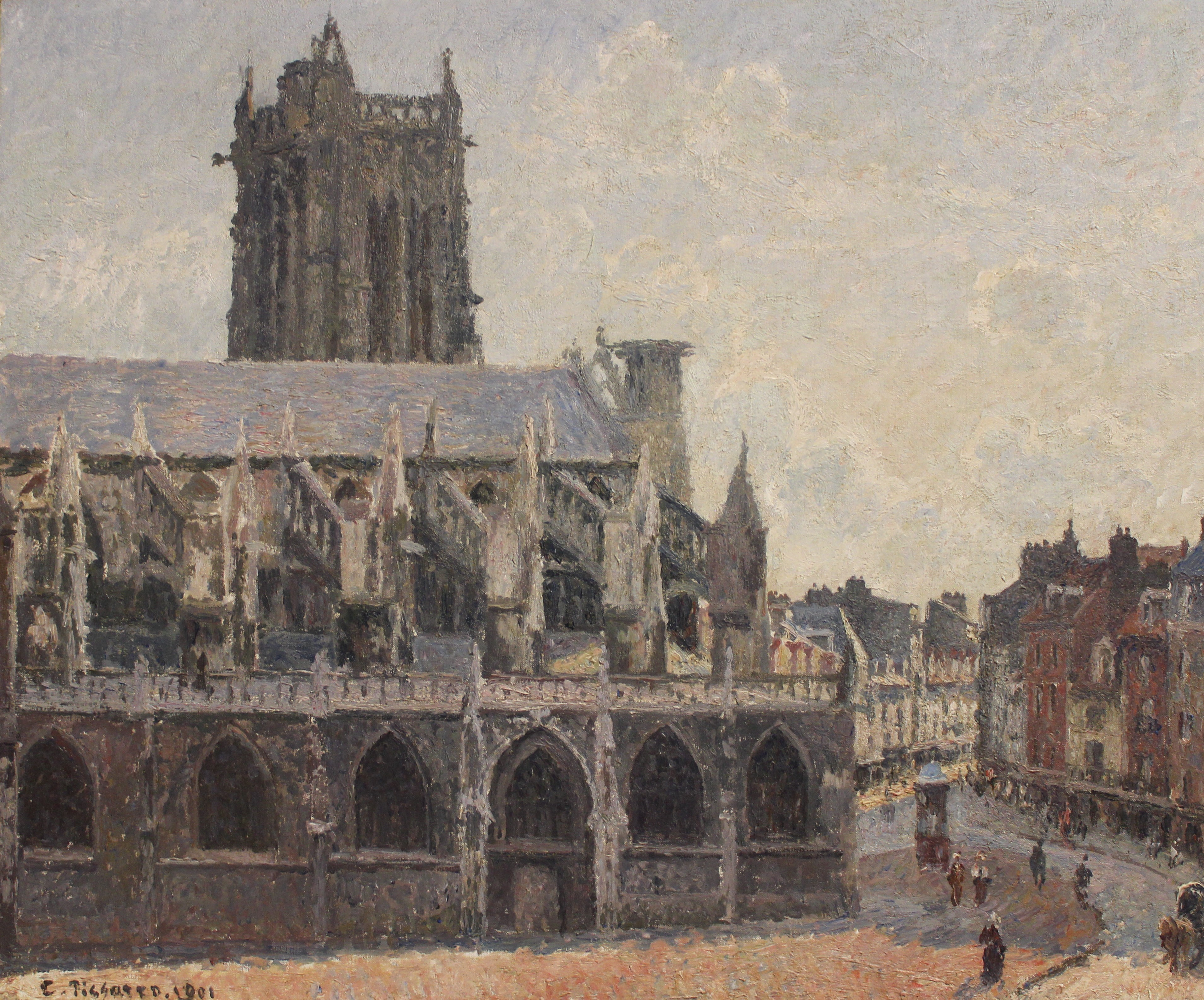 Pissarro (1830-1903) L'église saint-jacques à Dieppe, 1901 (100wikicommonsdays day 54)